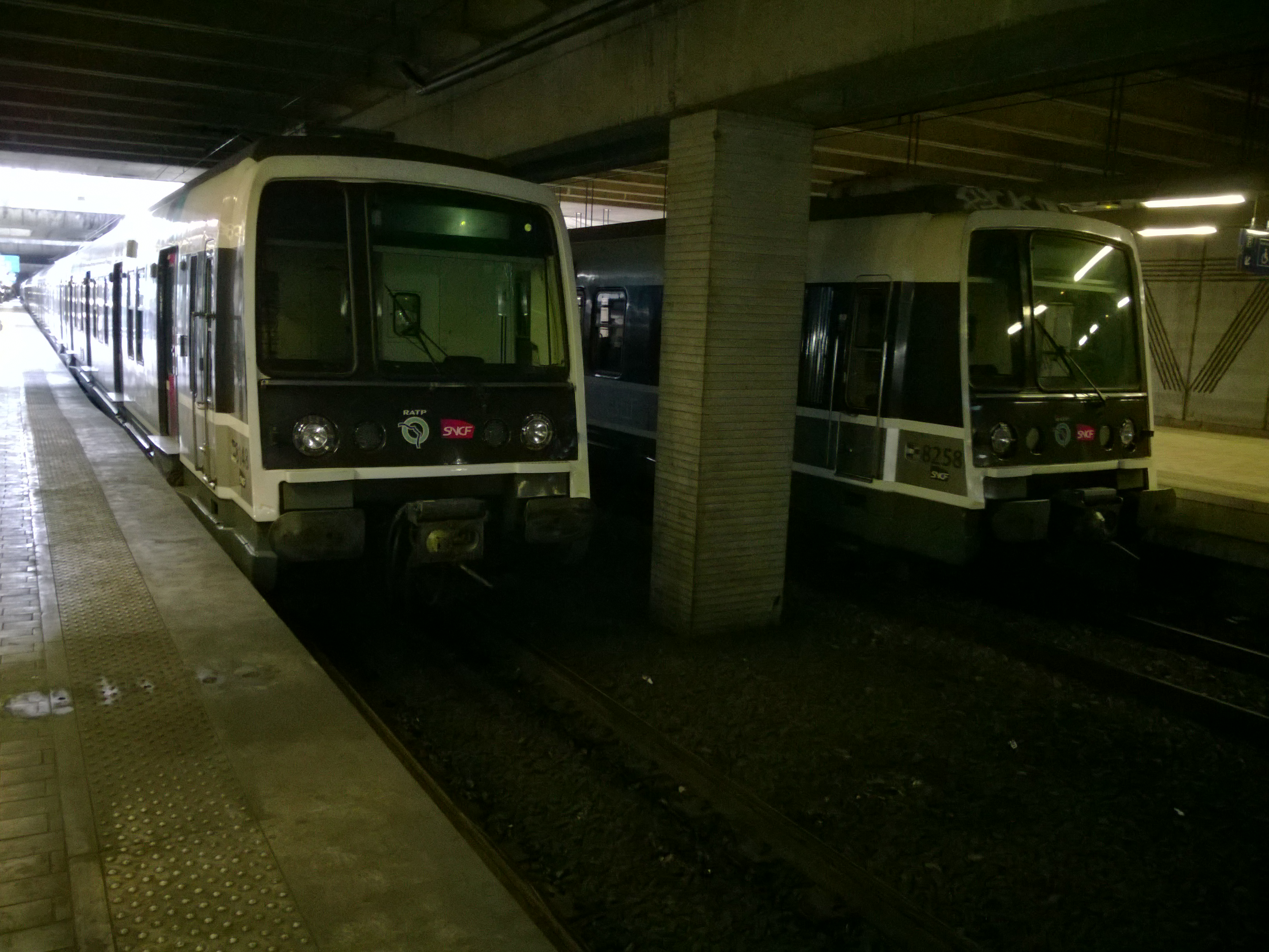 Deux MI79R, garées sur les voies centrales, en gare de l'aéroprot Charles-de-Gaulle 1.